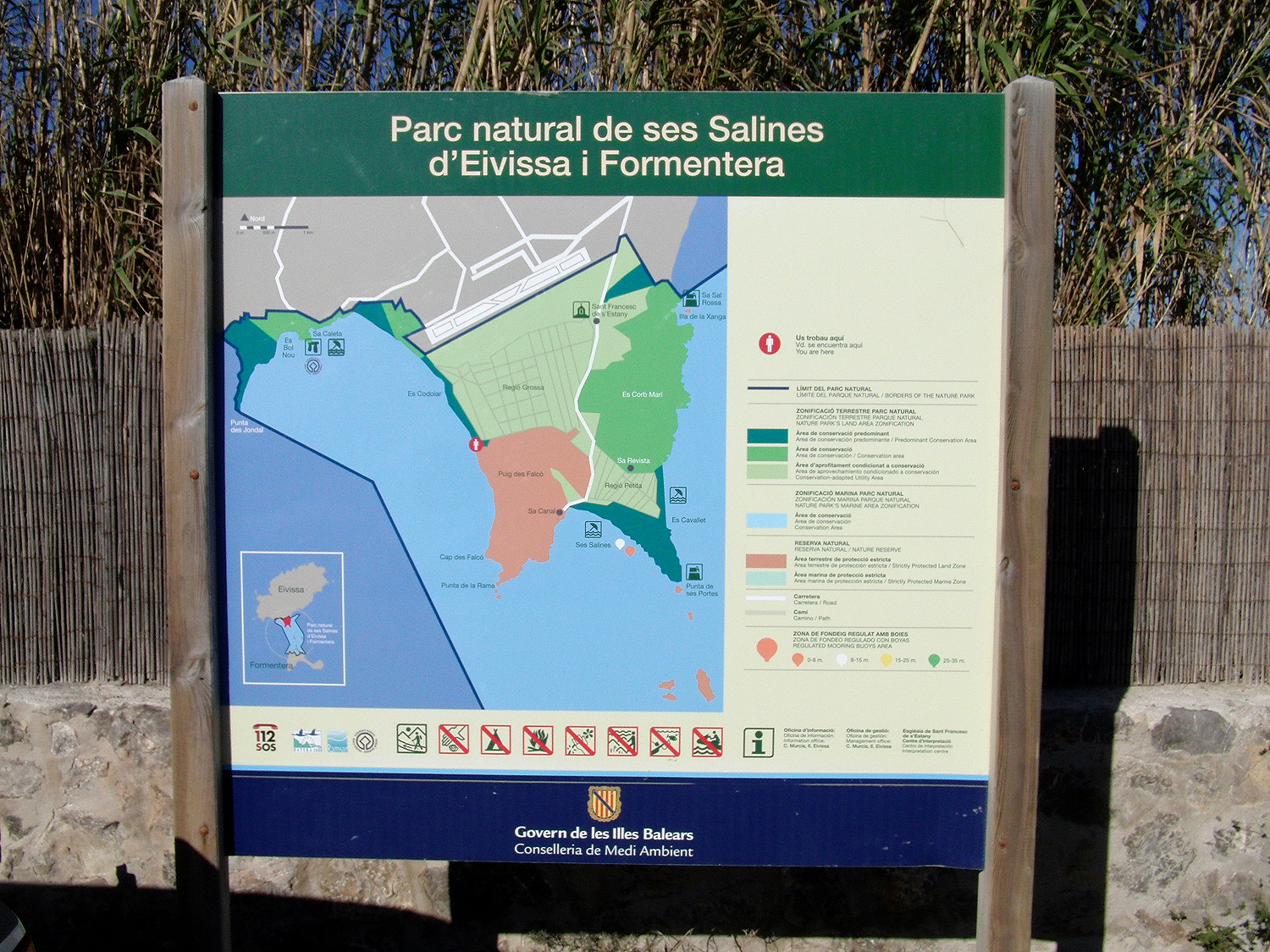 Hinweisschild im Parque Natural de Ses Salines, Ibiza 2011